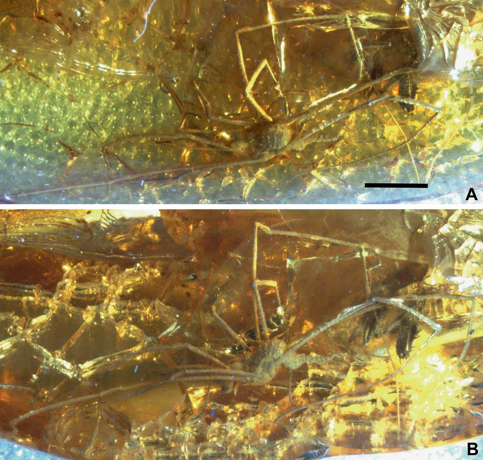 Piankhi steineri n. gen, n. sp. Overview of the complete animal (holotype and only known specimen: MB.A.1878) from Eocene Baltic amber (ca. 44–49 Ma). A. Dorsal view; B. Dorso-lateral view. Scale bar equals 2 mm.